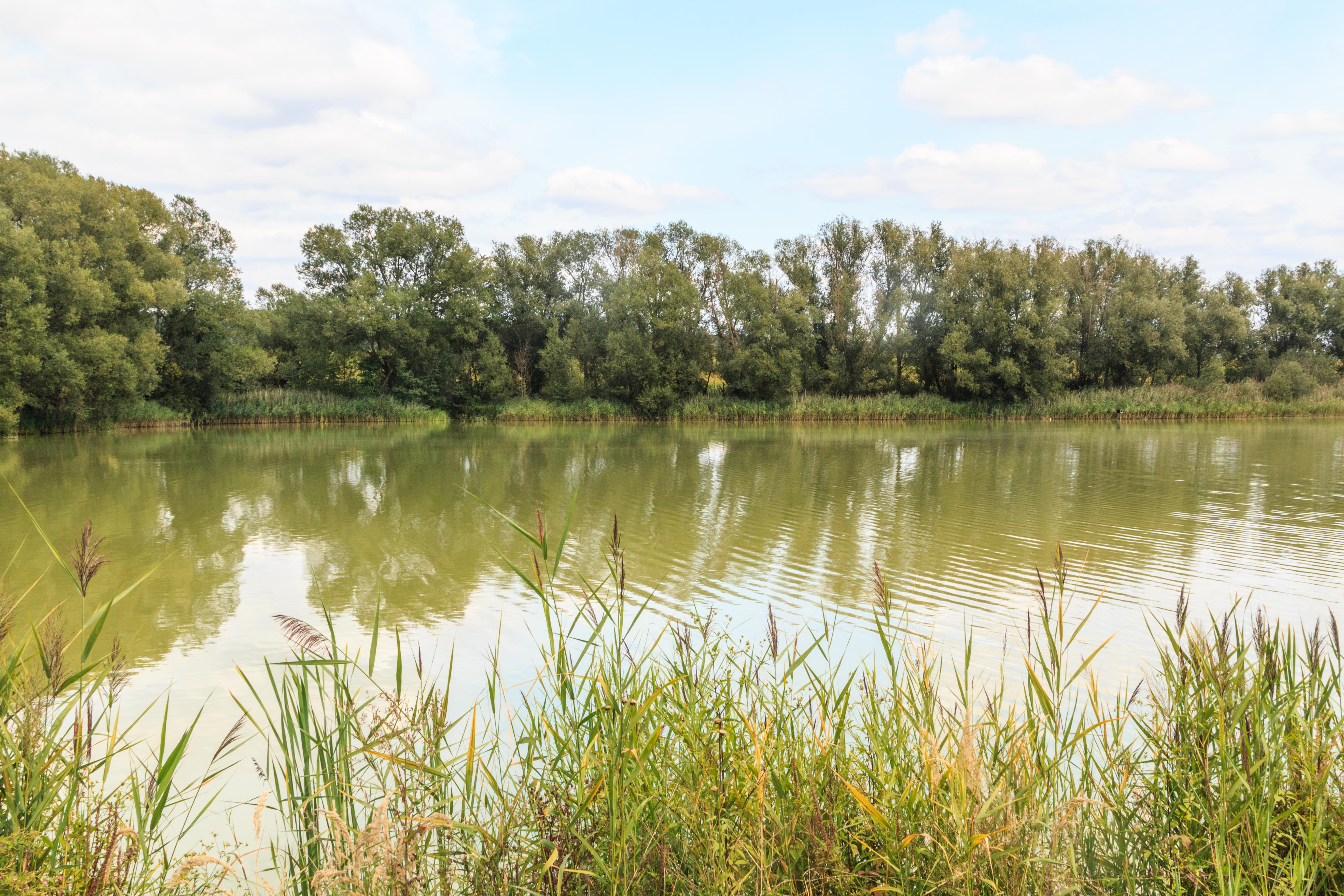 Končinský rybník